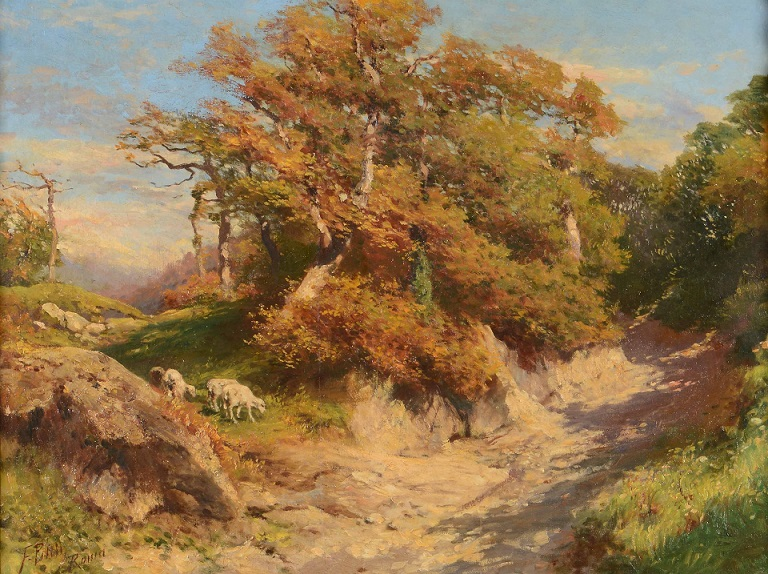 Paesaggio campestre, olio su tela, cm 72 x 92, firmato, coll. privata